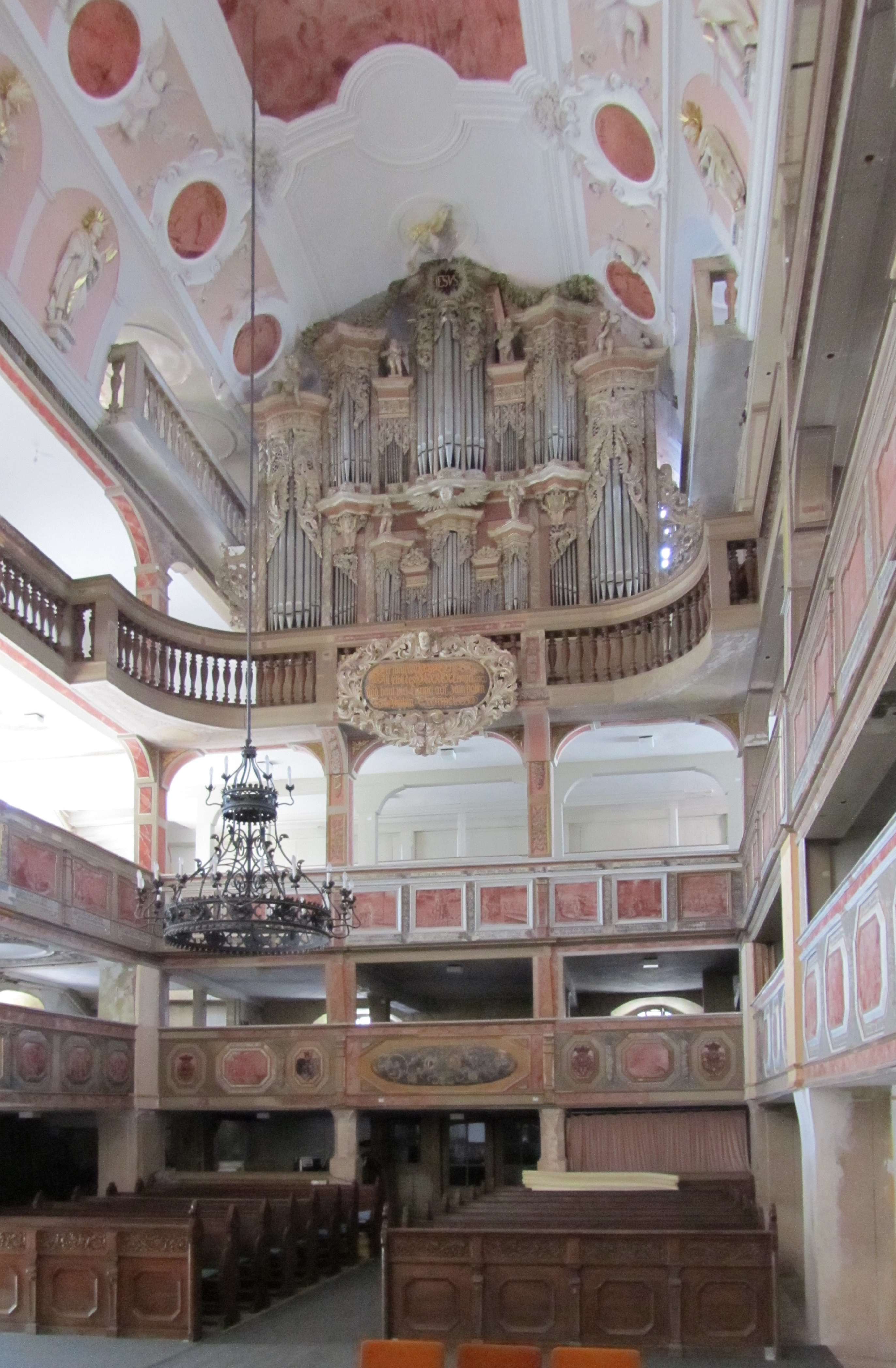 Die Orgel in der Stadtkirche von Buttstädt (Thüringen).